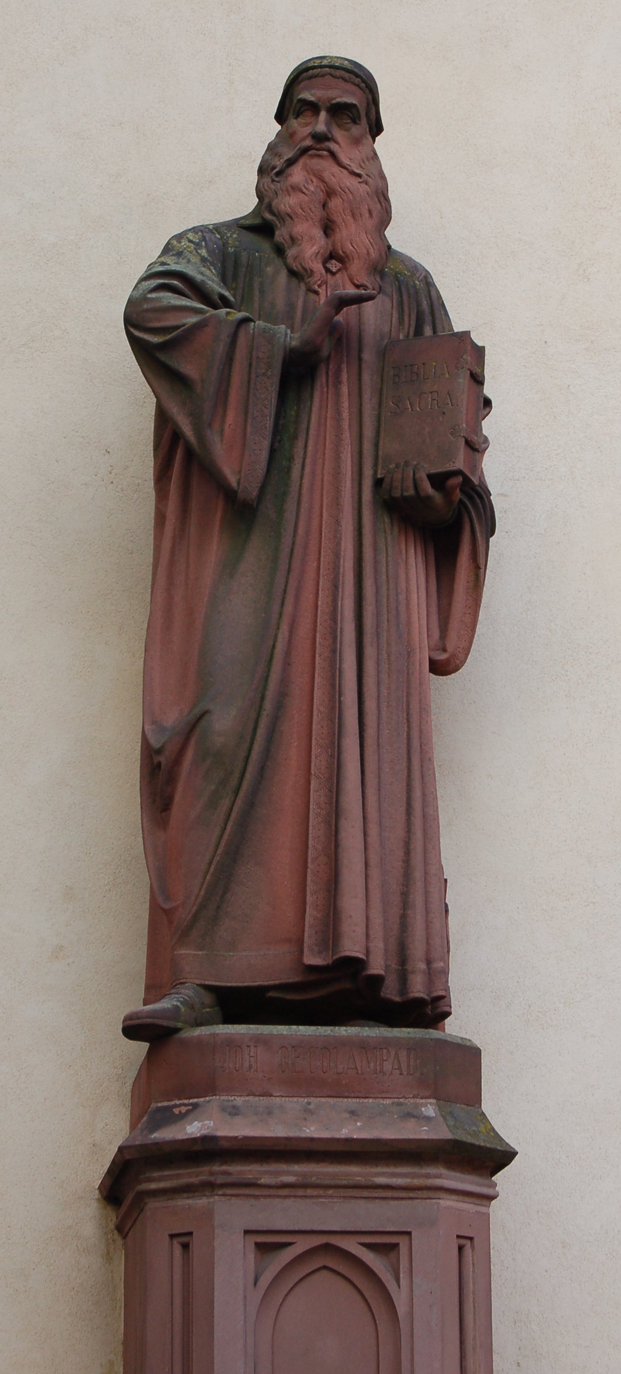 Oekolampad Statue am Basler Münster